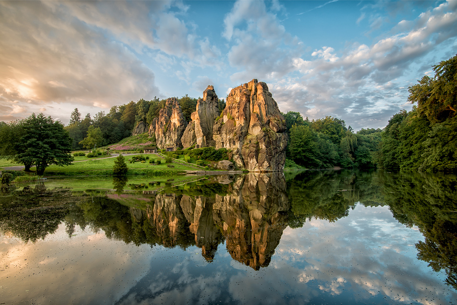 Die Externsteine im Teutoburger Wald bei Detmold in Horn-Bad Meinberg im schönsten Morgenlicht, es wirkt irgendwie wie Fantasy, aber ist real !! Nachdem ich mich schon um 5 Uhr hier mit dem Fotografen Raico getroffen habe, erlebten wir einen Bilderbuch-Sonnenaufgang an den Externsteinen. This is a photograph of an architectural monument. .4